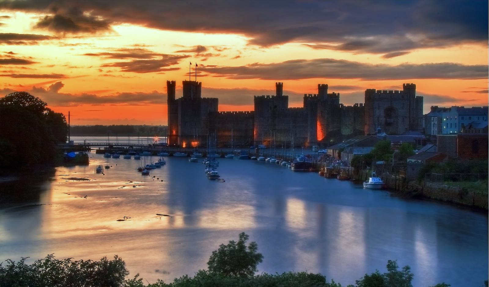 Caernarfon Castle in Caernarfon, Gwynedd, Wales.